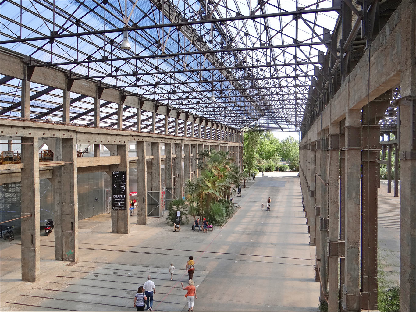 Les Nefs (sur la photo, on voit les parties non encore occupées) sont de grandes halles industrielles restaurées en espace couvert pour héberger l'atelier de production et la galerie d'exposition des Machines de l'île. Les architectes de la rénovation, choisis par le Maître d'ouvrage Nantes Métropole sont Nicole Concordet et Christophe Theilmann Référence : Guide de l'architecture